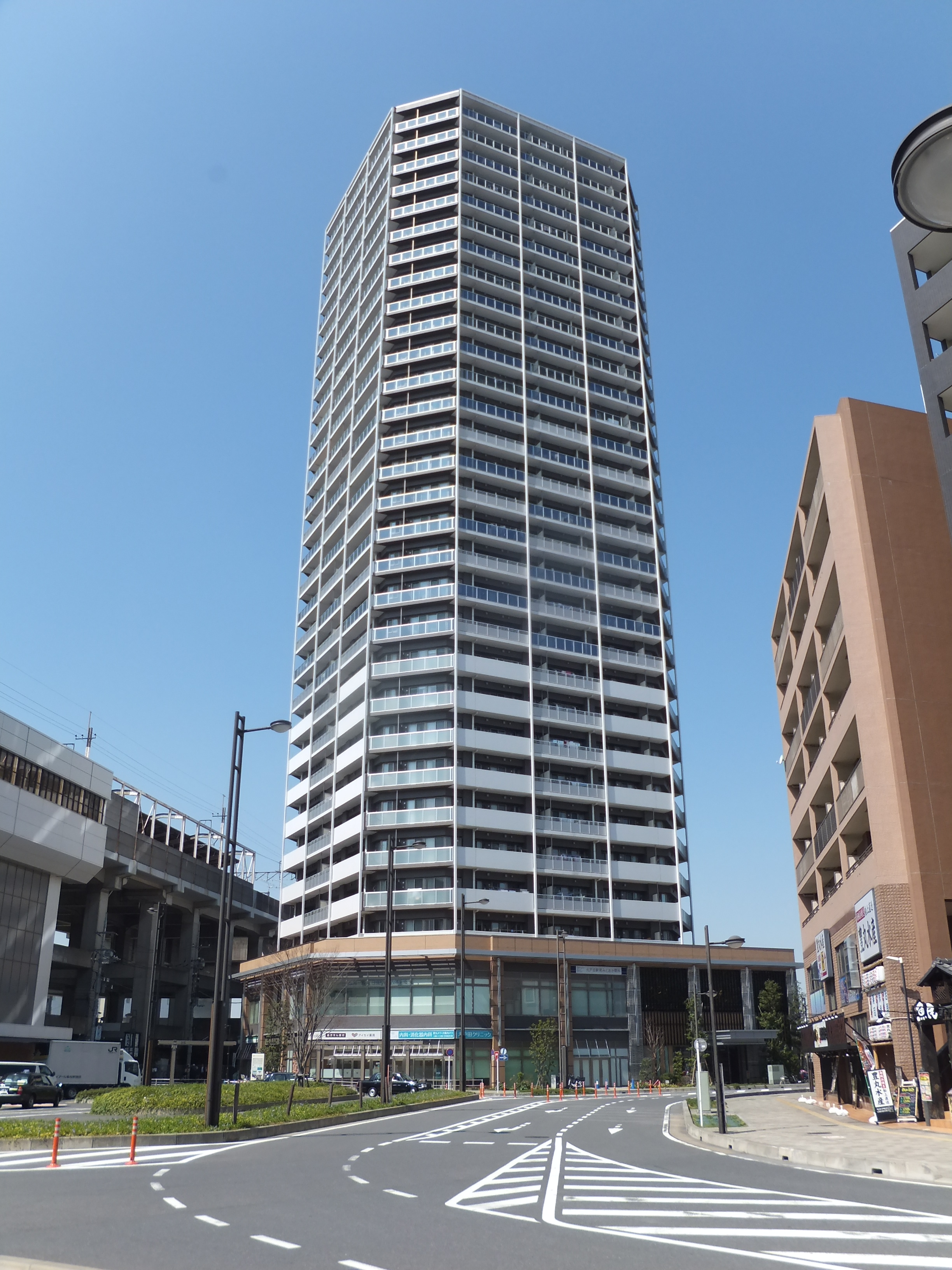 北戸田ファーストゲートタワー（埼玉県戸田市）